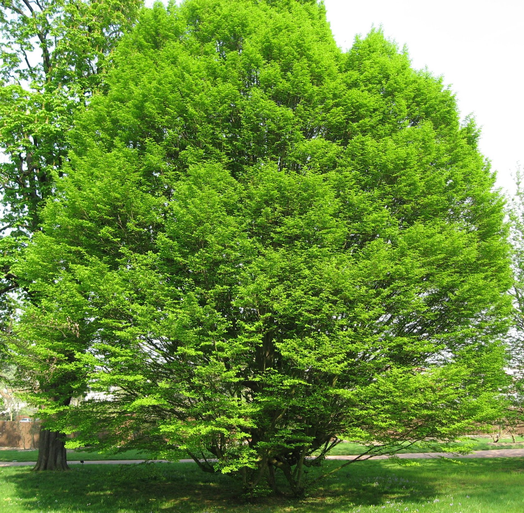 Carpinus betulus 'Fastigiata' L. (Charme pyramidal) in Arboretum de la Vallée-aux-Loups Map: 48° 46' 22" N 2° 16' 5" E